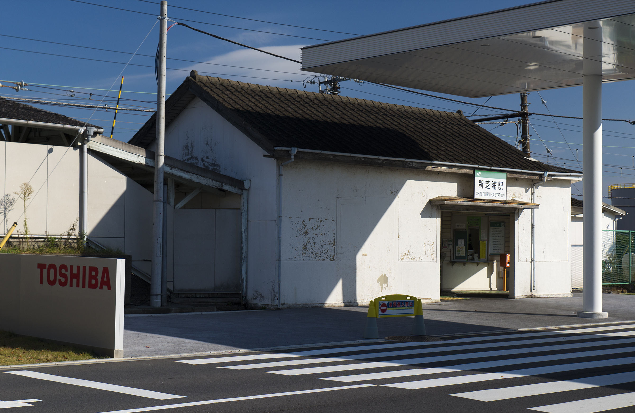 東日本旅客鉄道株式会社鶴見線新芝浦駅駅舎